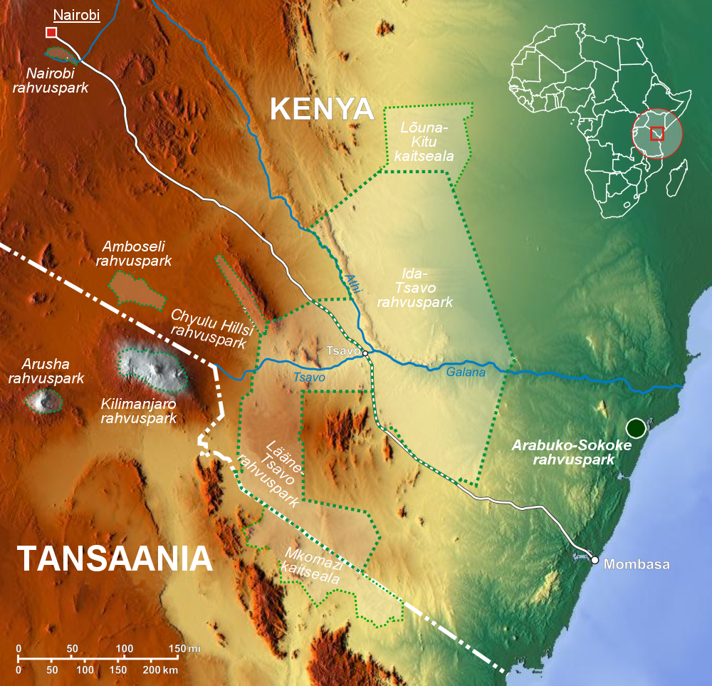 Arabuko-Sokoke rahvuspargi asukoht